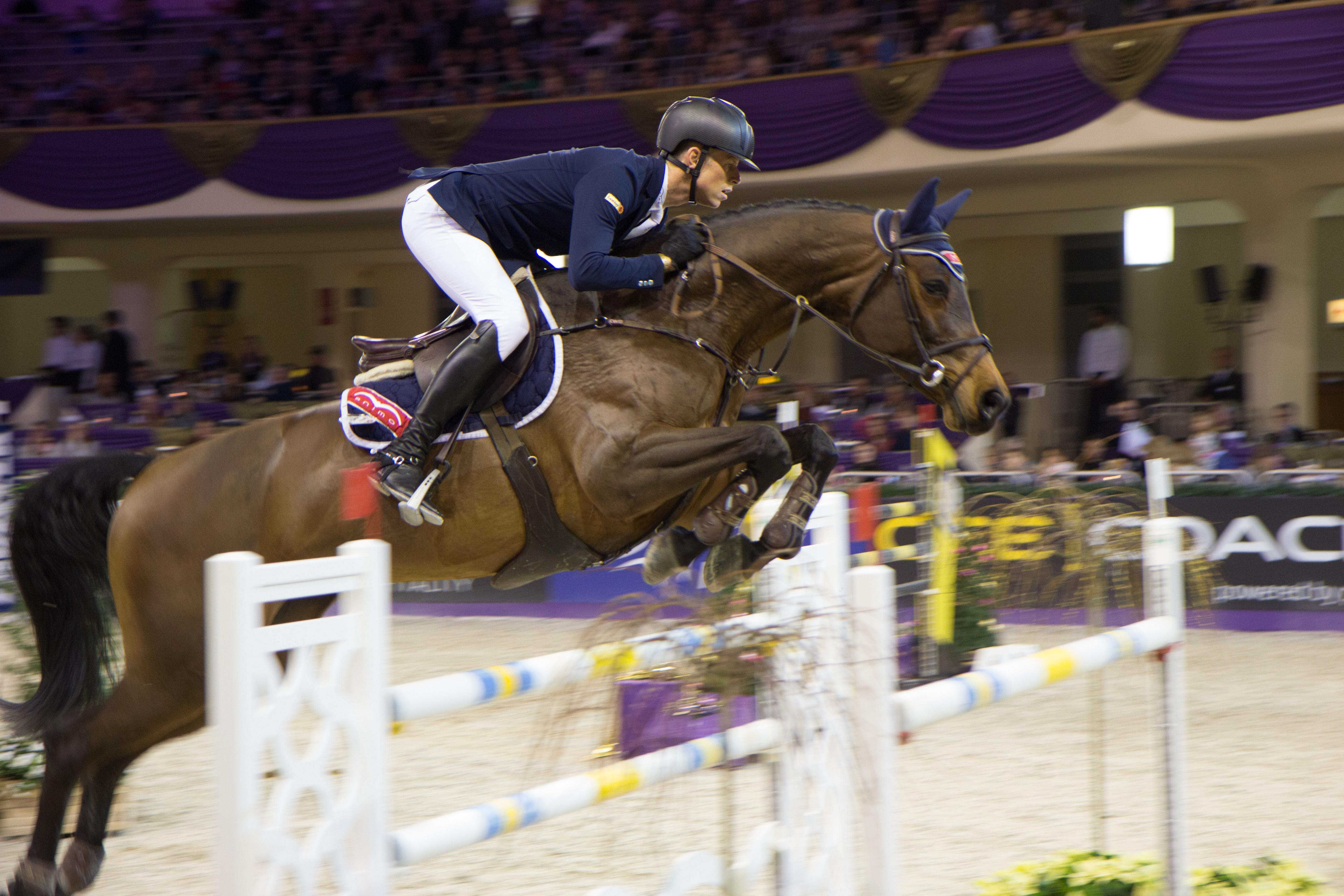 Internationales Festhallen Reitturnier 2017 in Frankfurt. Max Kühner auf Argentina-243